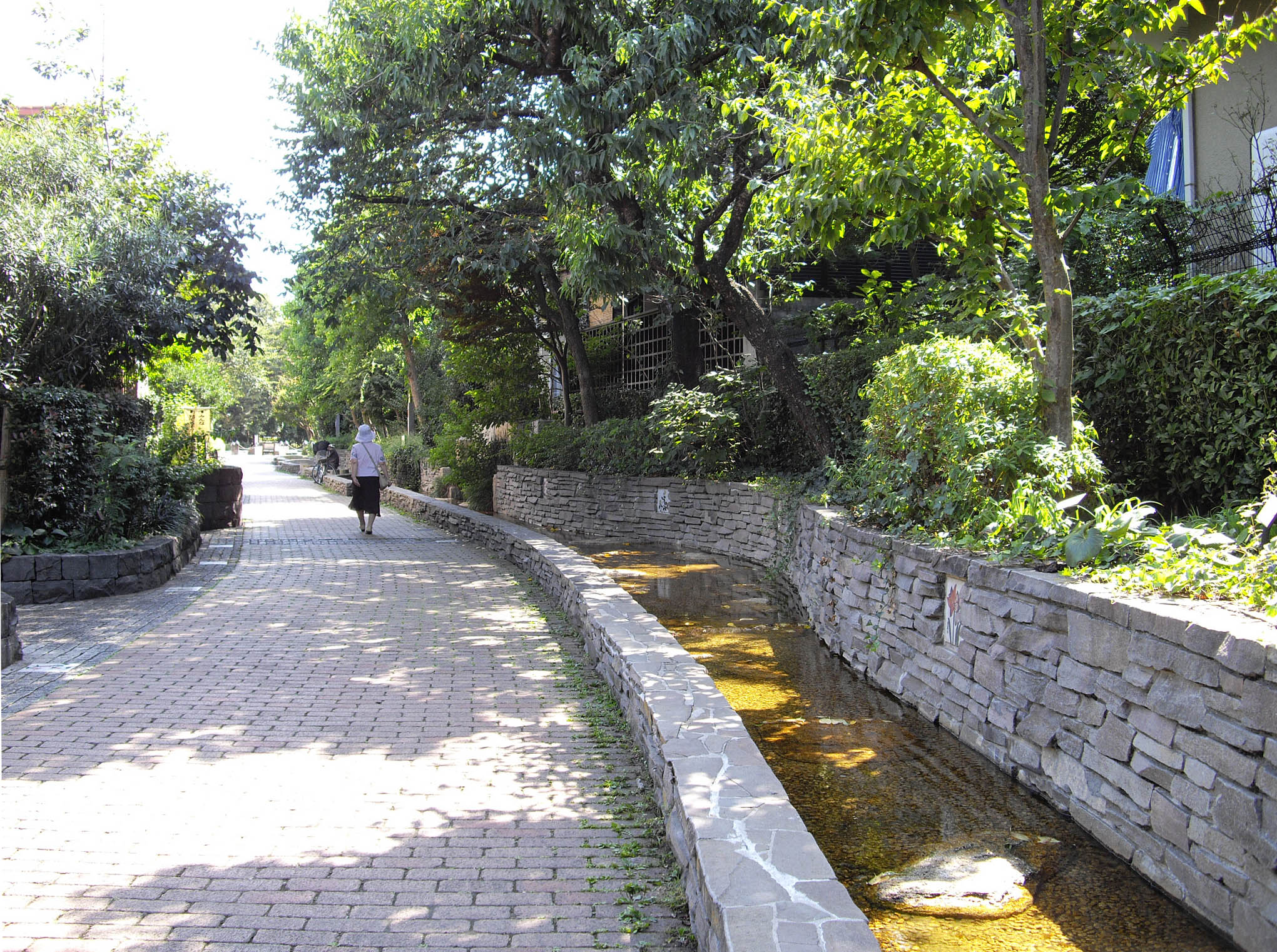 世田谷区立烏山川緑道